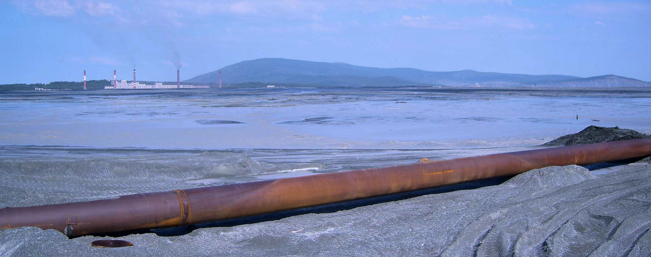 Хвостохранилище